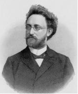 Josef Miroslav Weber (1854 - 1906), Český houslista a hudební skladatel.